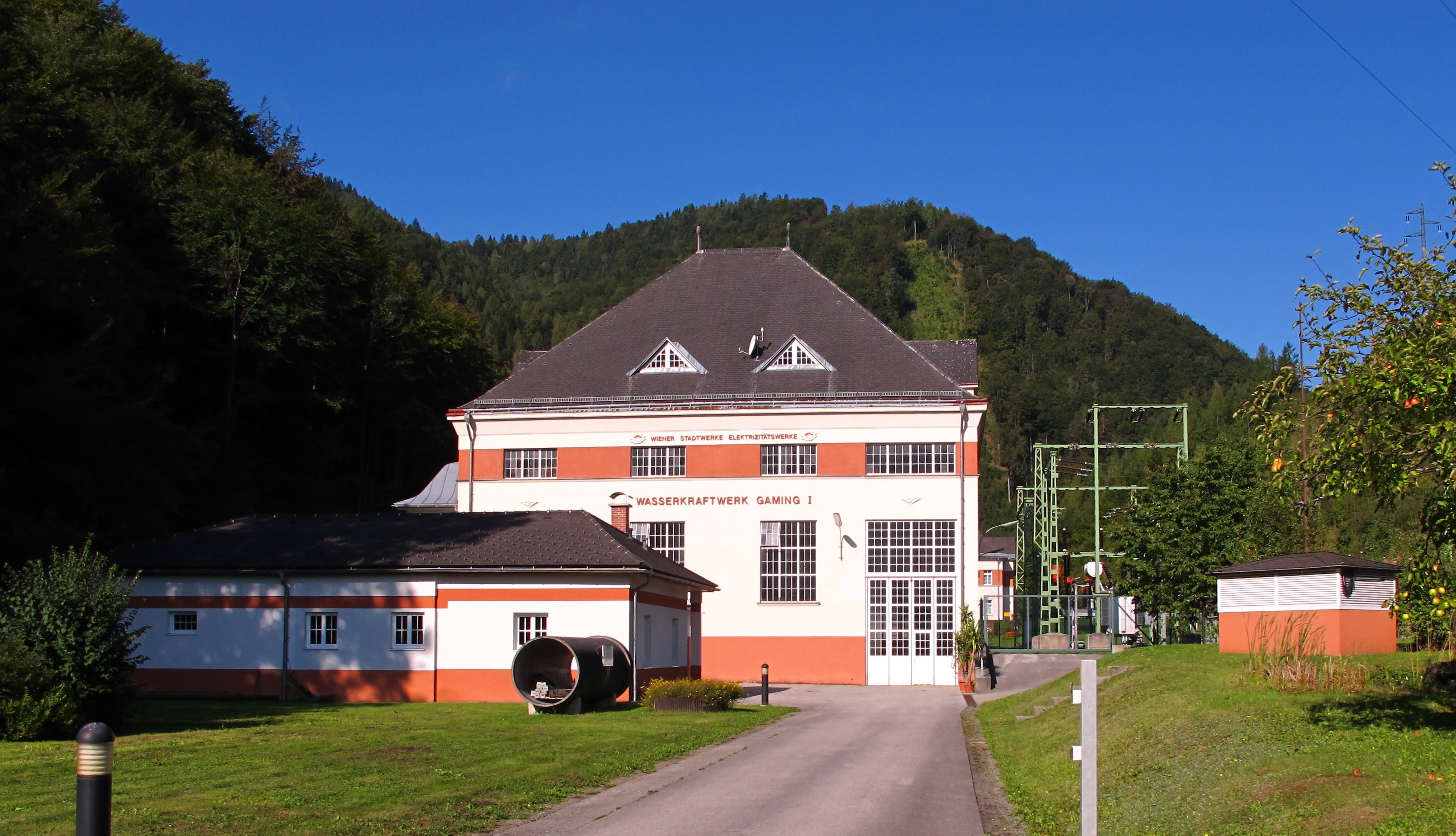 Wasserleitungskraftwerk Gaming I, Maschinenhaus